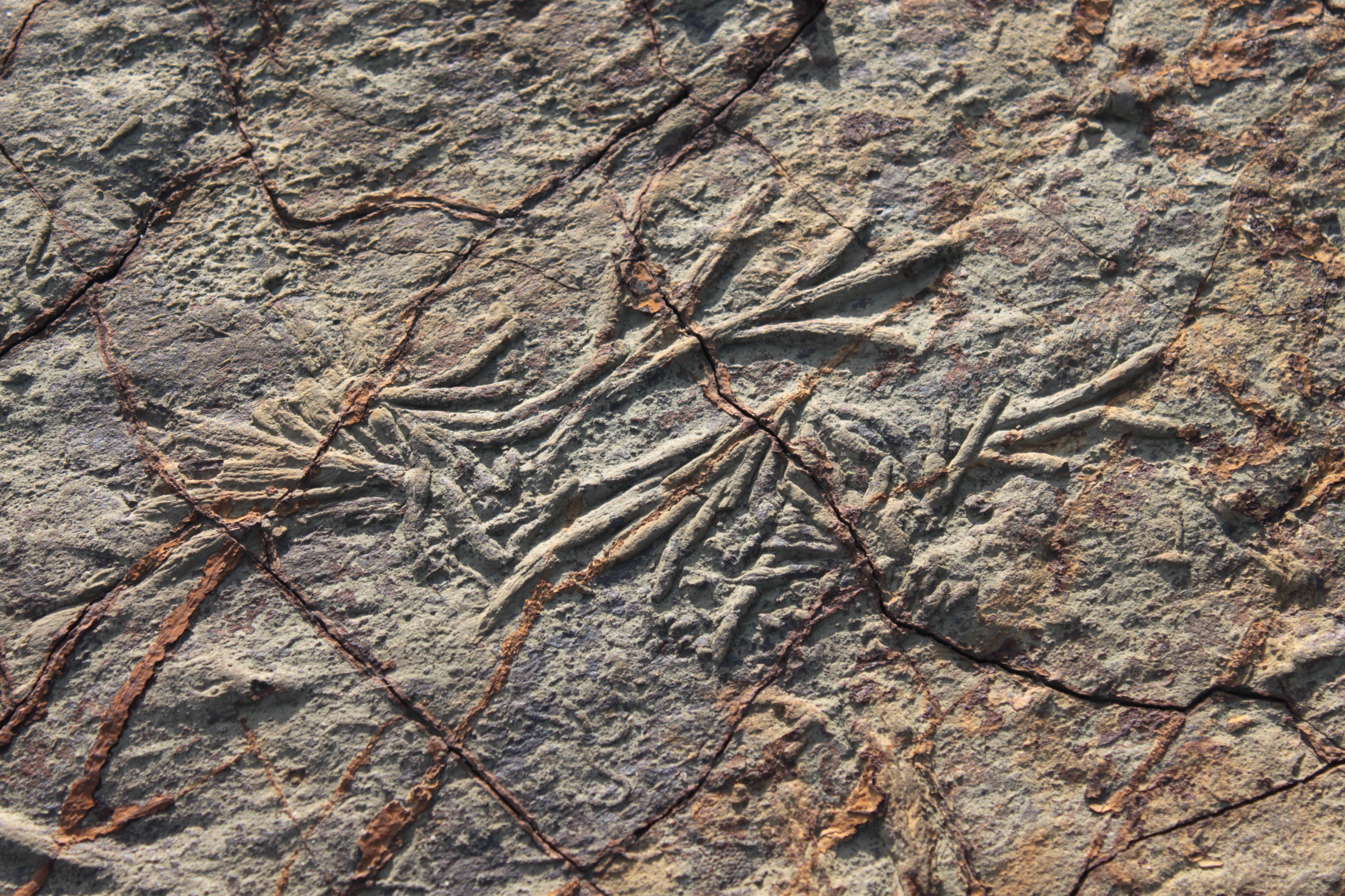 Icnofósil Taenidion y Paleodictyon minimum (en el centro del borde inferior de la imagen) en arenisca de los flyschs de punta de San García. Complejos del Campo de Gibraltar, Unidad de Algeciras (Oligoceno-Mioceno). Algeciras, Andalucía, España.